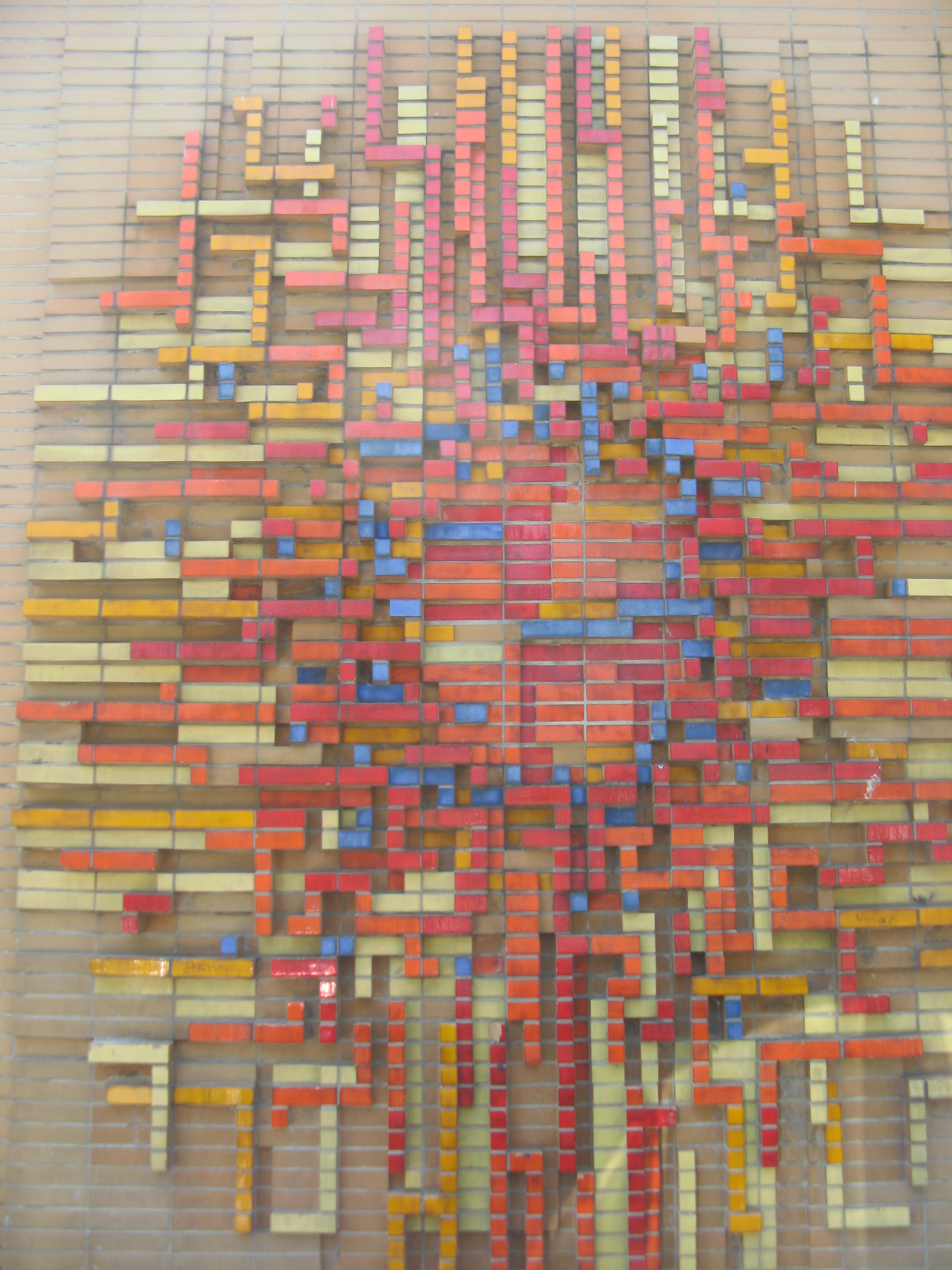 Sonne (1972), keramisches Relief von Peter Gangl, Wendstattgasse 5, Per-Albin-Hansson-Siedlung Ost, Wien-Favoriten